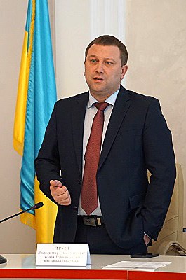 Голова Тернопільської ОДА Володимир Труш.